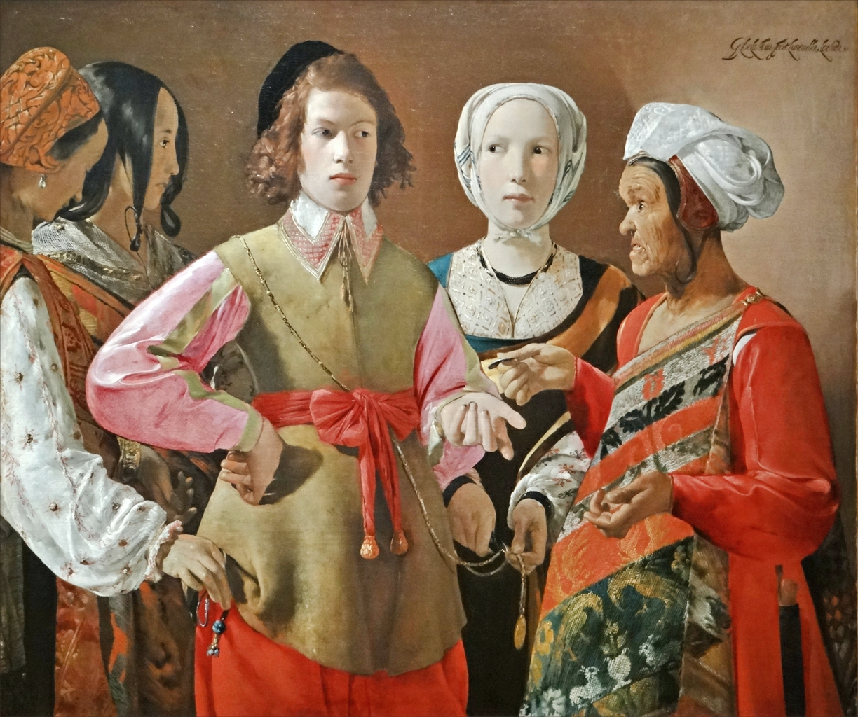 La diseuse de bonne aventure Rogers Fund, 1960 Exposition "Bohèmes" au Grand Palais, Galeries nationales